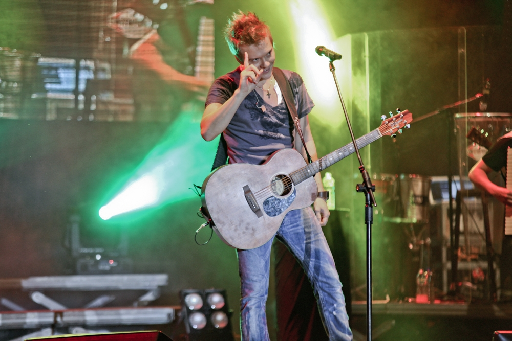 Michel tocando violão em Volta Redonda - RJ